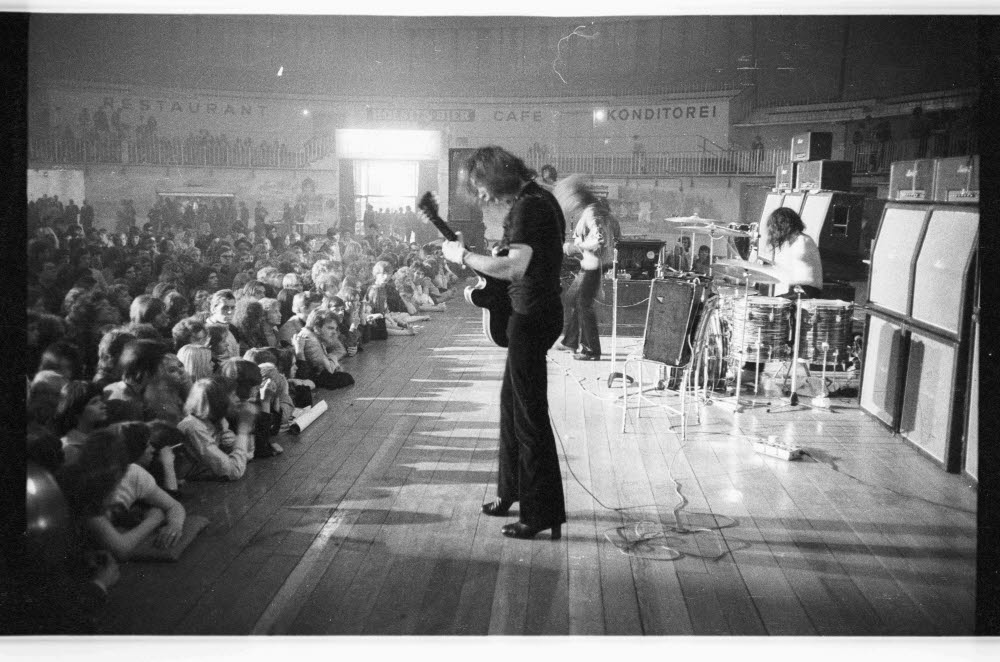 Rockband Deep Purple in der Ostseehalle zum Auftakt ihrer Deutschlandtournee